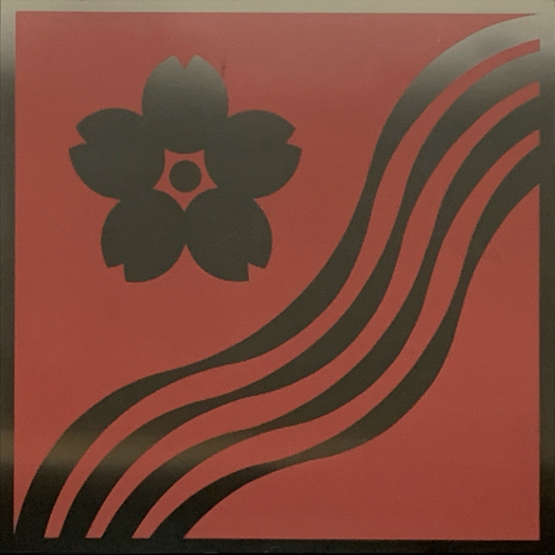 都営新宿線瑞江駅のホームで撮影された瑞江駅のシンボル